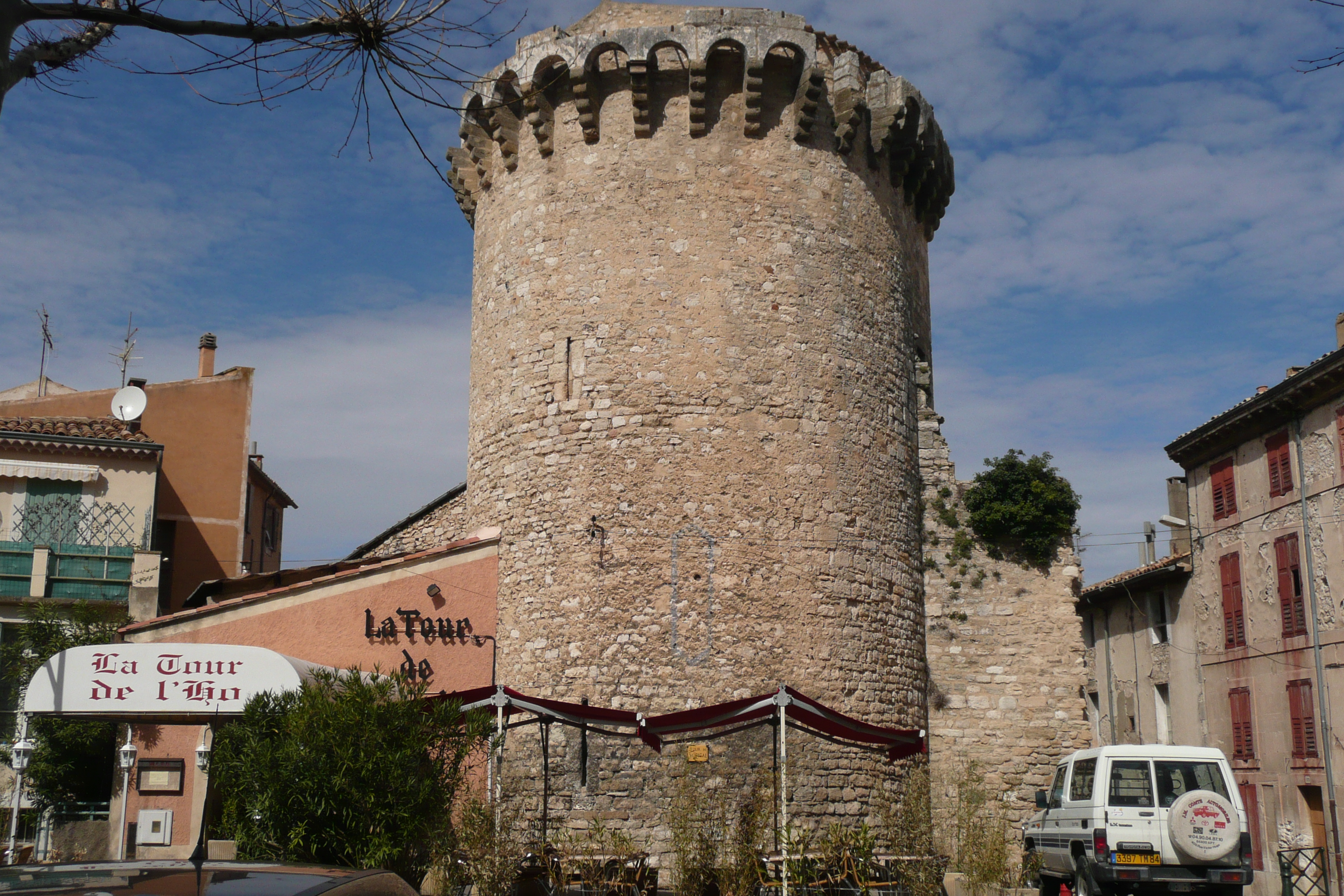 La tour à Apt.